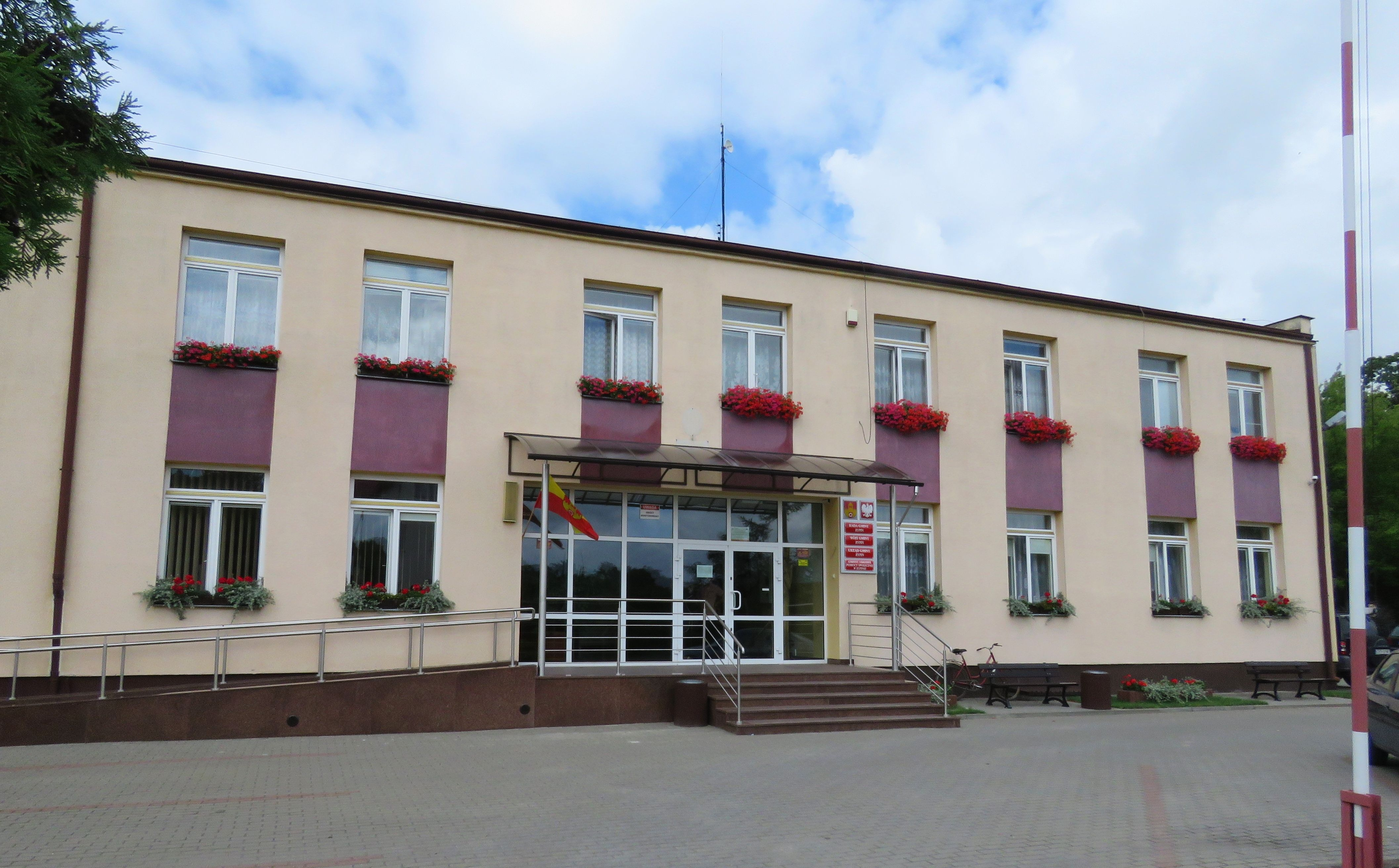 Urząd Gminy w Rypinie